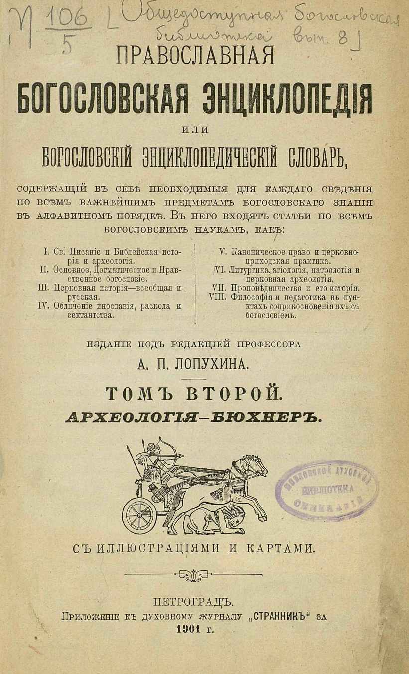 Православная богословская энциклопедия. 1901 год. Том 2. Титульный лист.